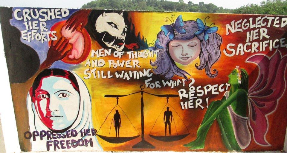 കേളി 2013 ന്‍റെ ഭാഗമായി നടന്ന Grafti മത്സരം